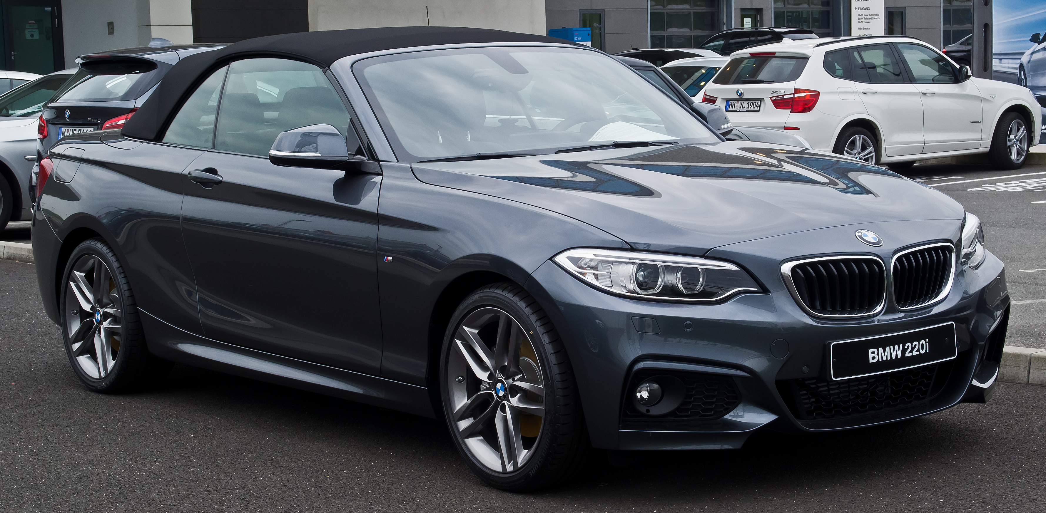 BMW 220i Cabriolet M Sport (F23)